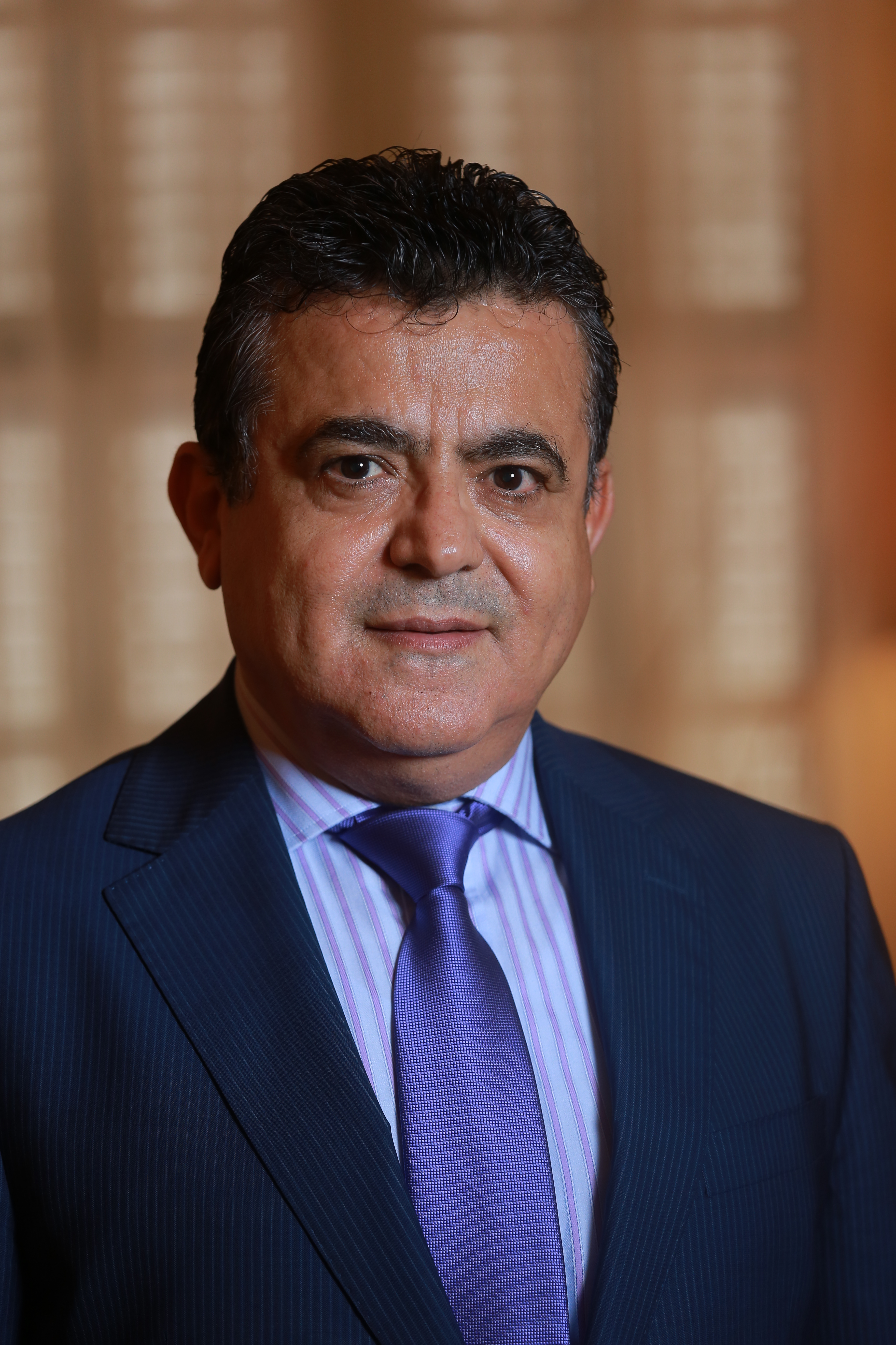 Chân dung Đại sứ Saadi Salama